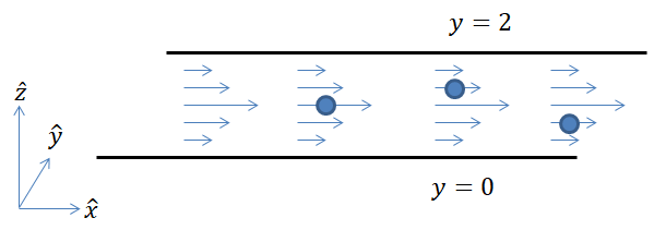 זרימה של מים בנהר כפי שמתוארת בדוגמה. שלושה כדורים קשורים לנקודות שונות - הראשונה לא מסתובבת, השנייה מסתובבת נגד כיוון השעון והשלישית עם כיוון השעון